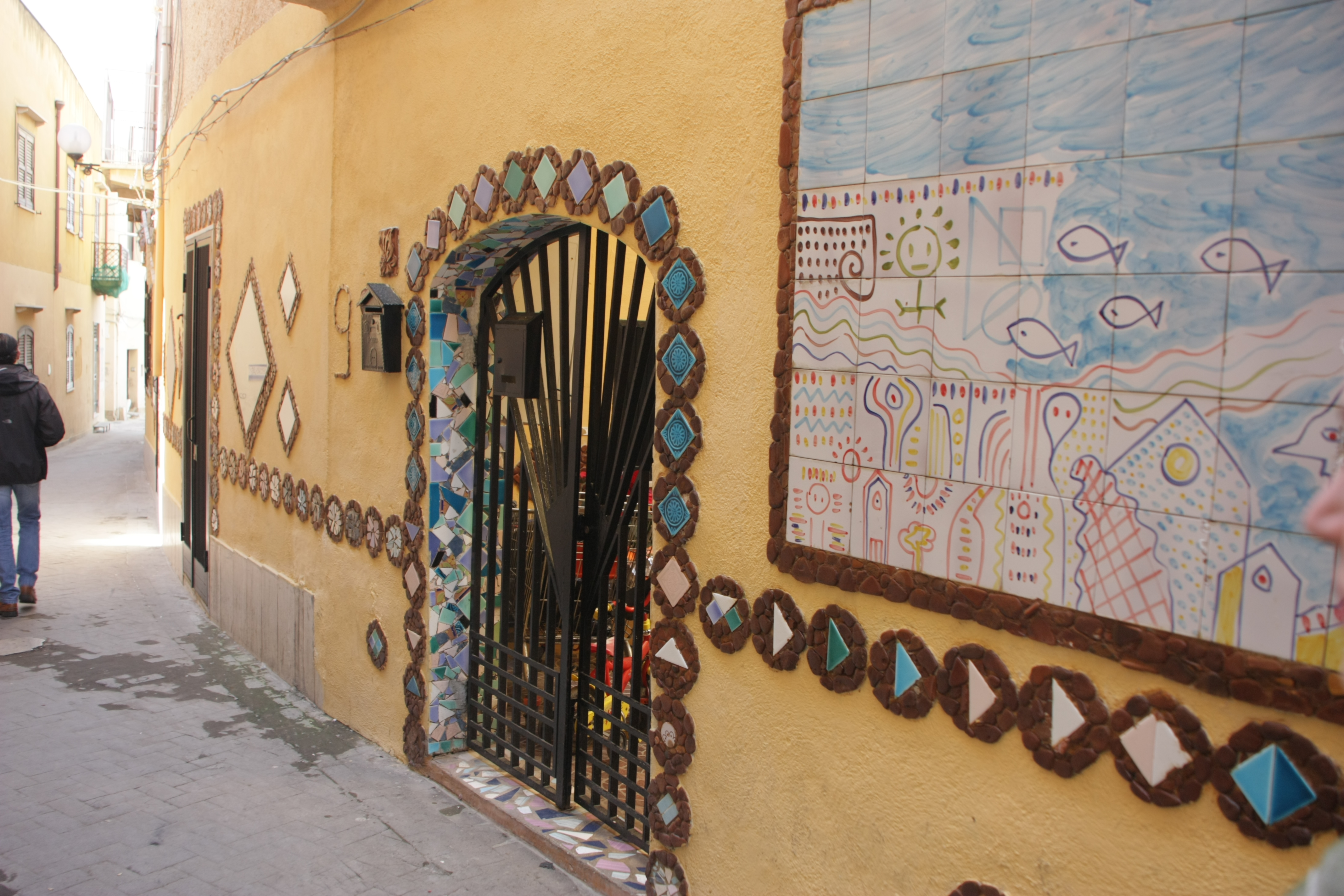 Kasbah district (Mazara del Vallo)